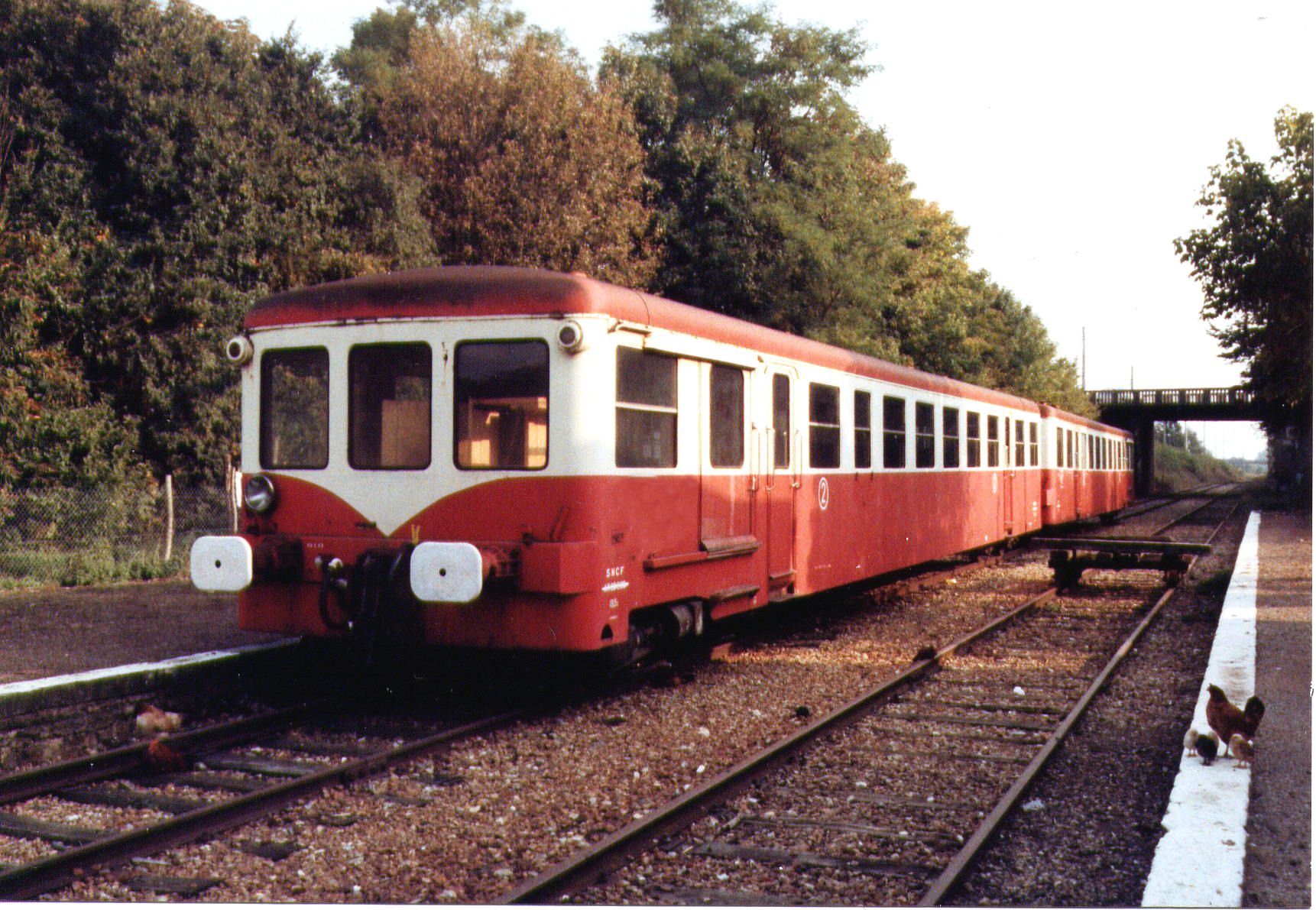 Remorque unifiee autorail Decauville type XRBD 2eme classe -1962